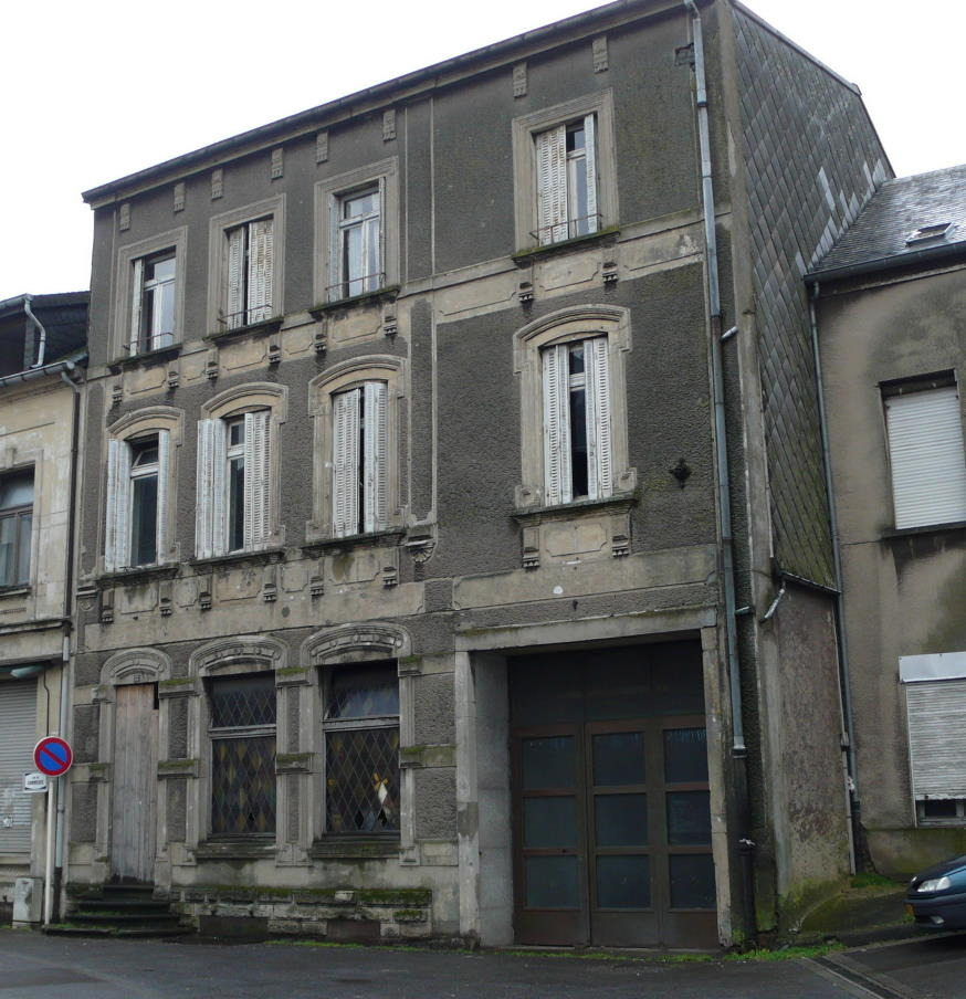 Kino Palace .